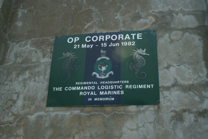 Ajax Bay, East Falkland